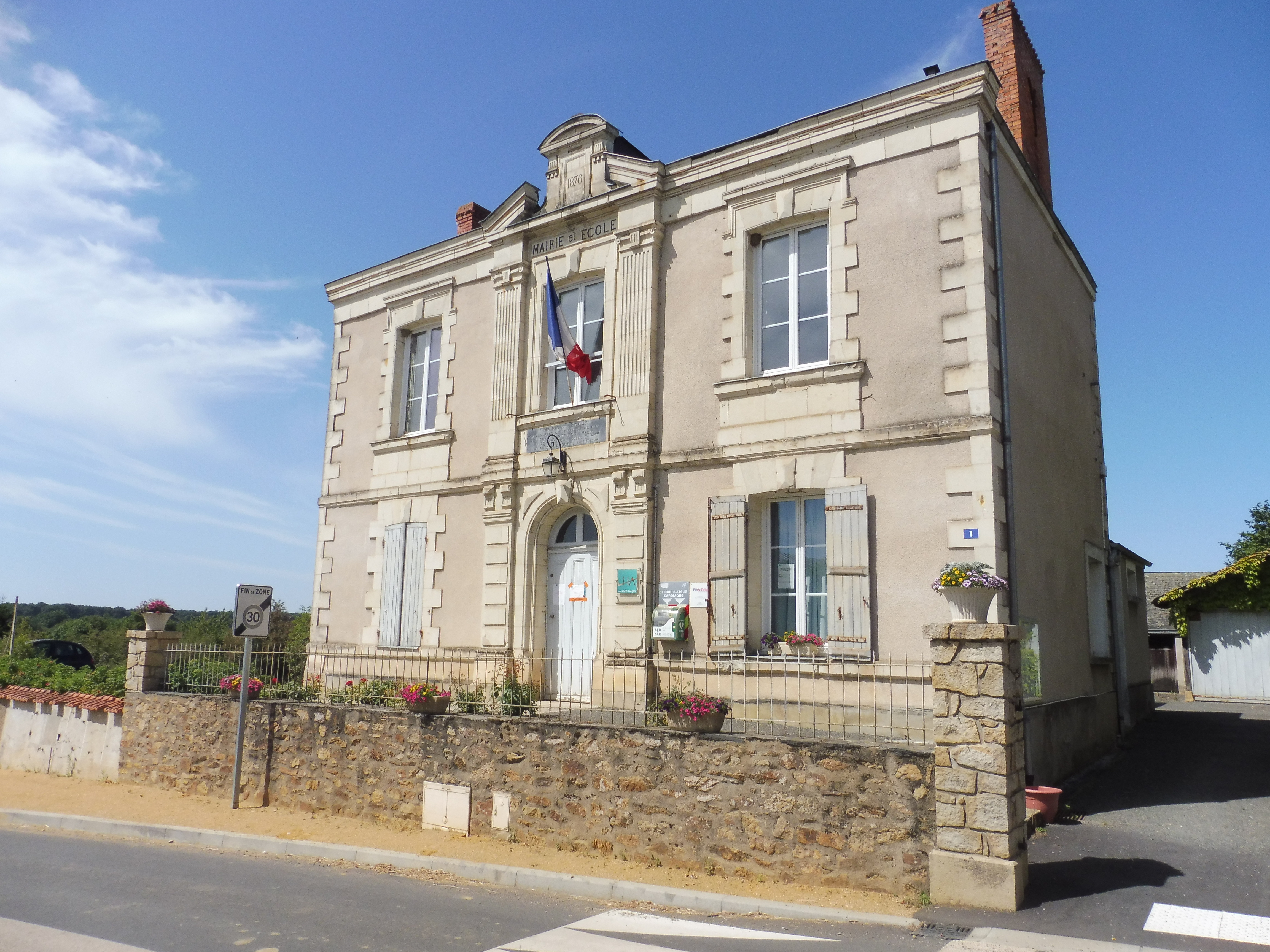 La mairie du village de Querré